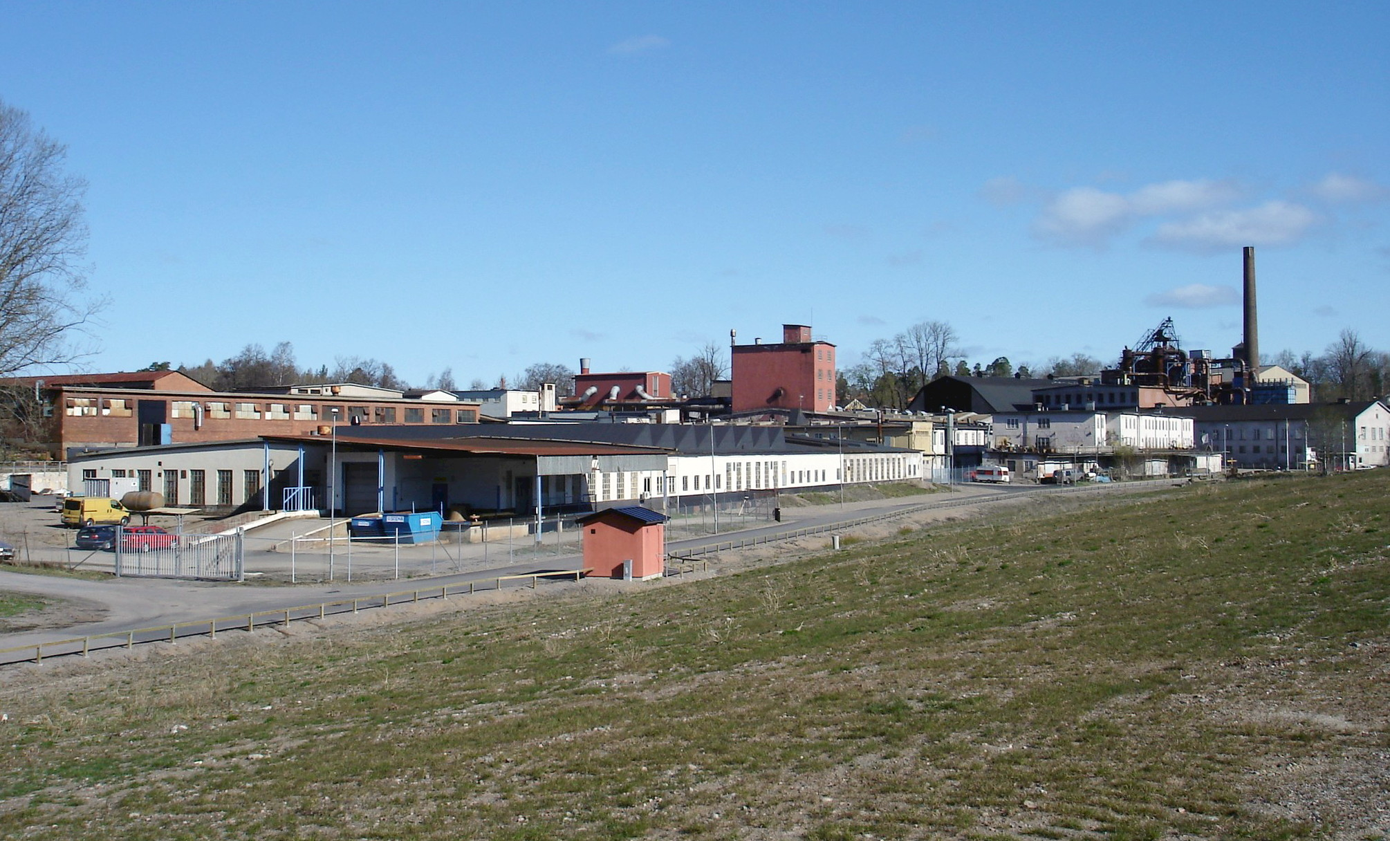 Hälleforsnäs Bruk